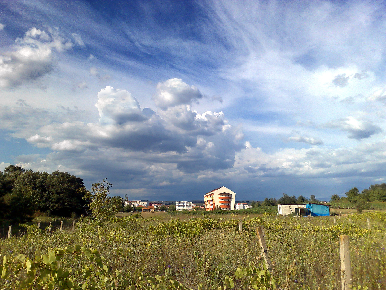 Paesaggio circostante Medjugorie (Bosnia-Erzegovina)